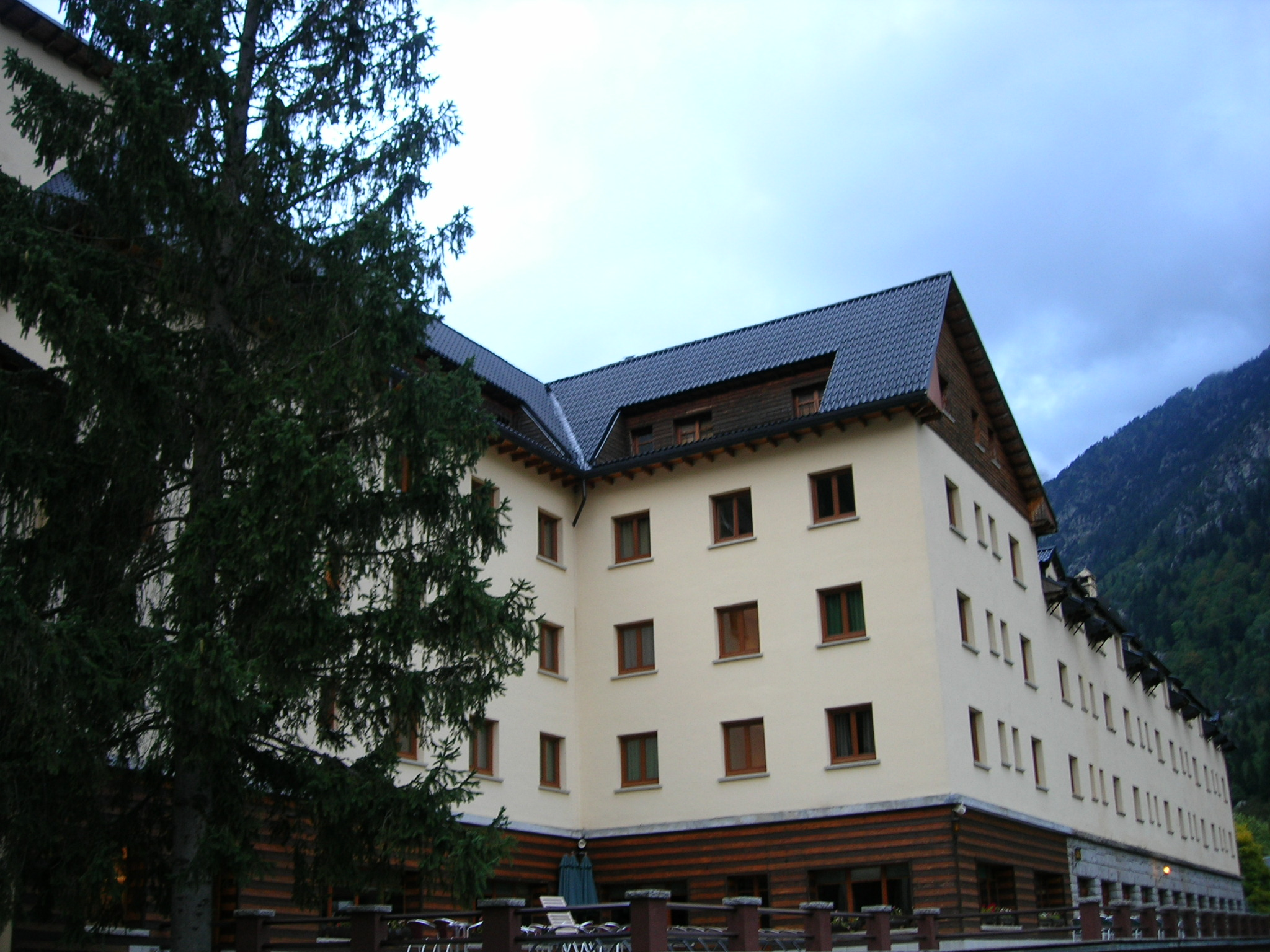 Balneari Hotel Manatial (la Vall de Boí)